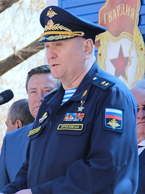 Начальник штаба — первый заместитель командующего Воздушно-десантными войсками России Герой Российской Федерации генерал-лейтенант Игнатов Николай Иванович